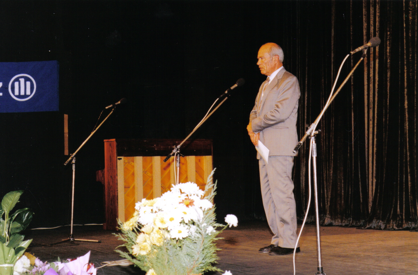 Почетен гост академик Стойчо Панчев